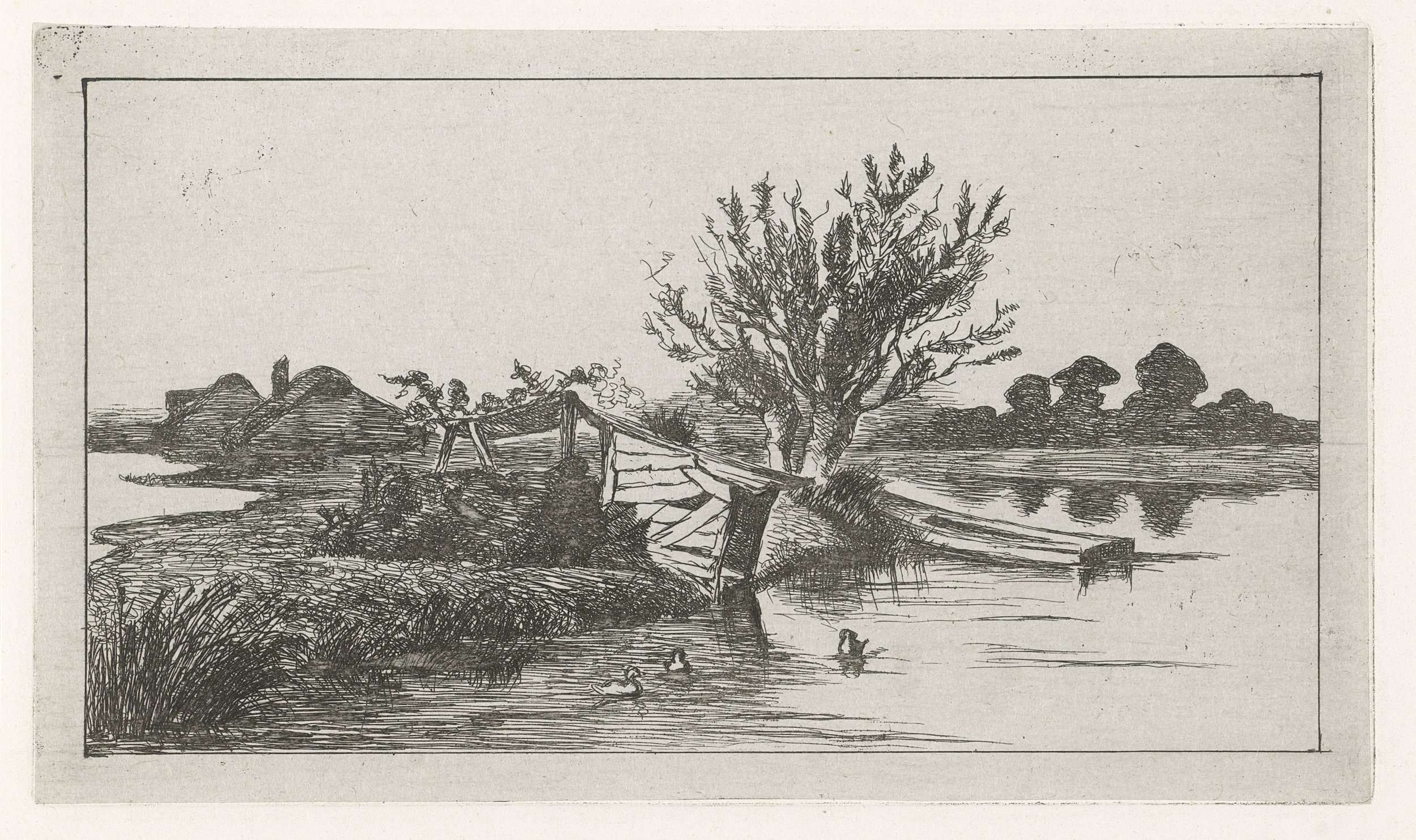 Iconclasscode 25H213; Iconclasscode: 25I3; Iconclasscode: 25F36(DUCK); print